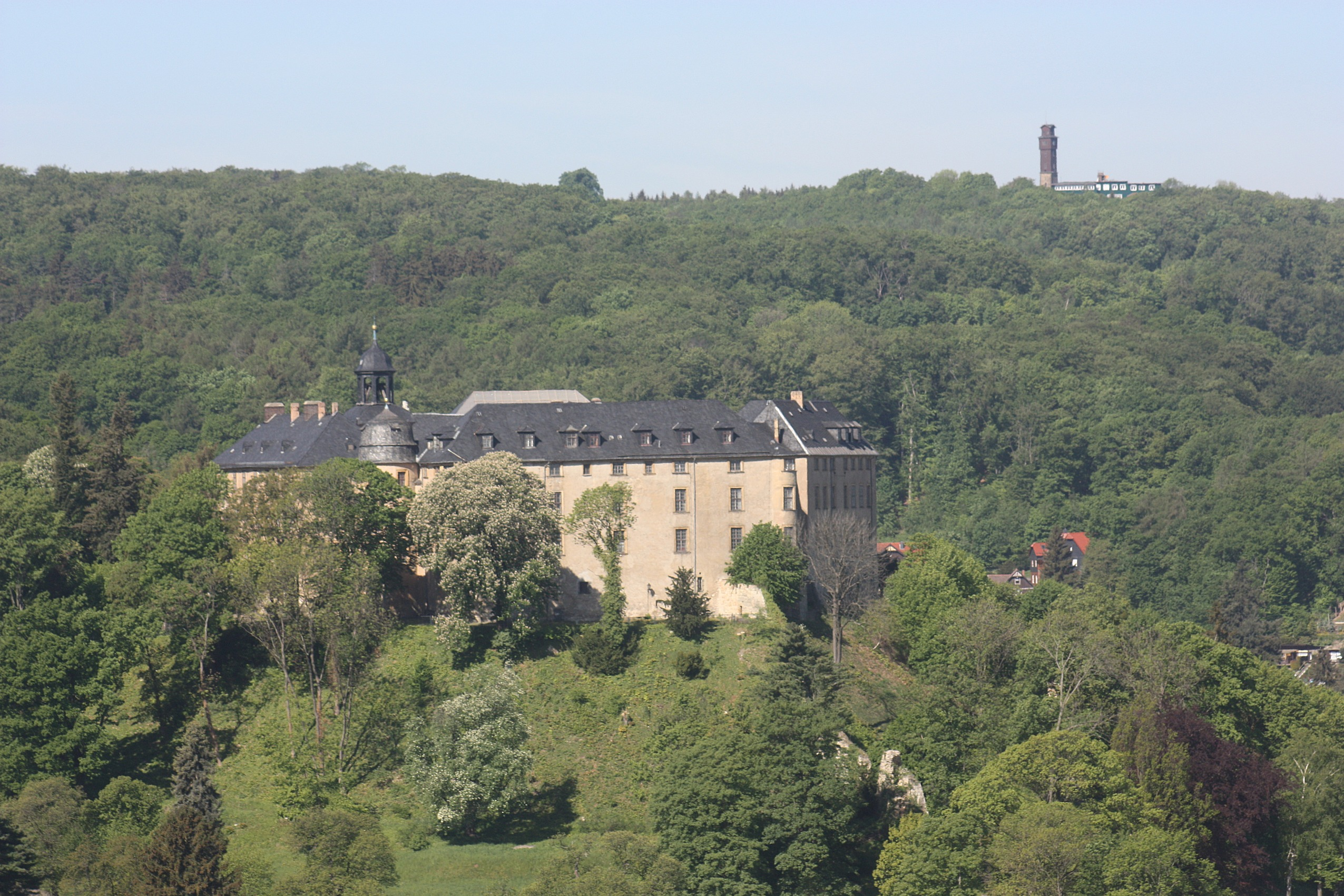 Schloss Blankenburg, vom Großvater aus gesehen